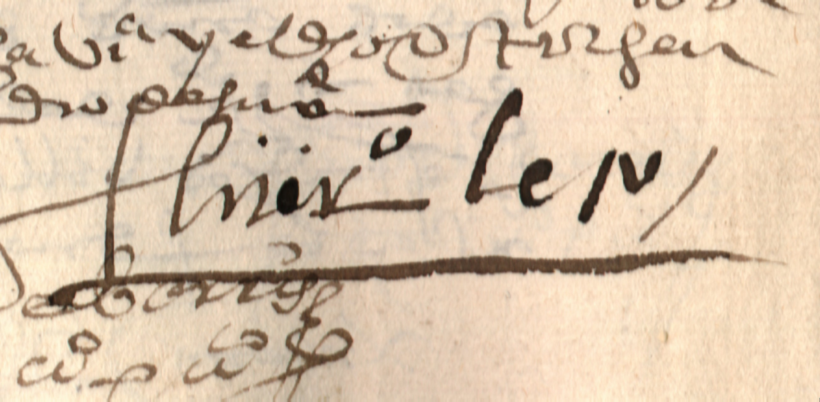 Firma de Gerónimo Leto (Archivo Histórico de la Casa Nacional de Moneda)